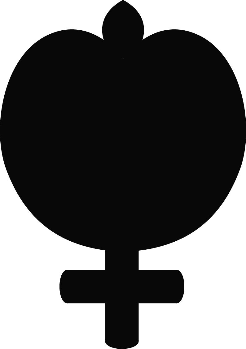 UDK Discordias logo